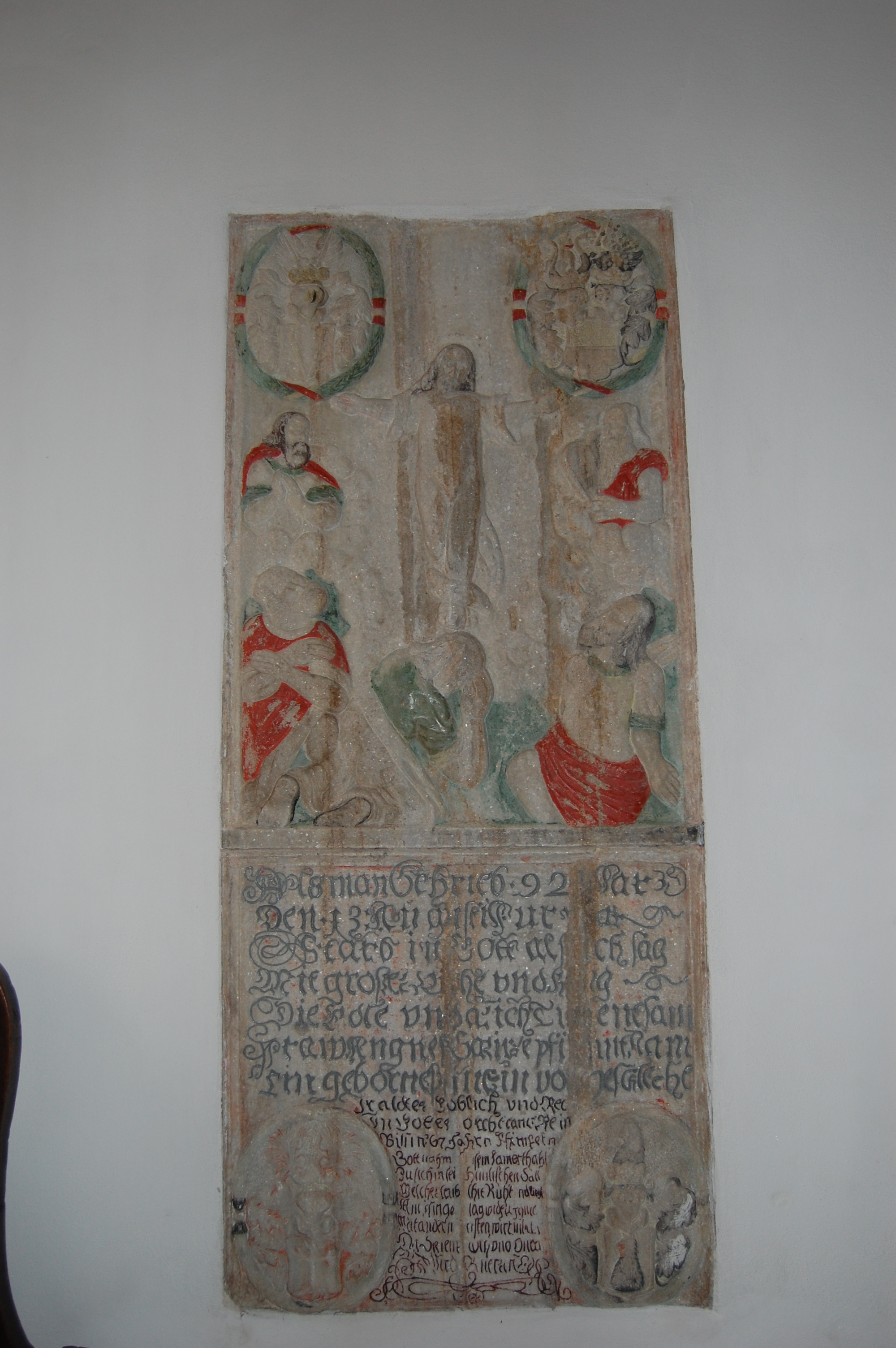 Böhmischbruck, Epithaph in der Pfarrkirche Mariä Himmelfahrt